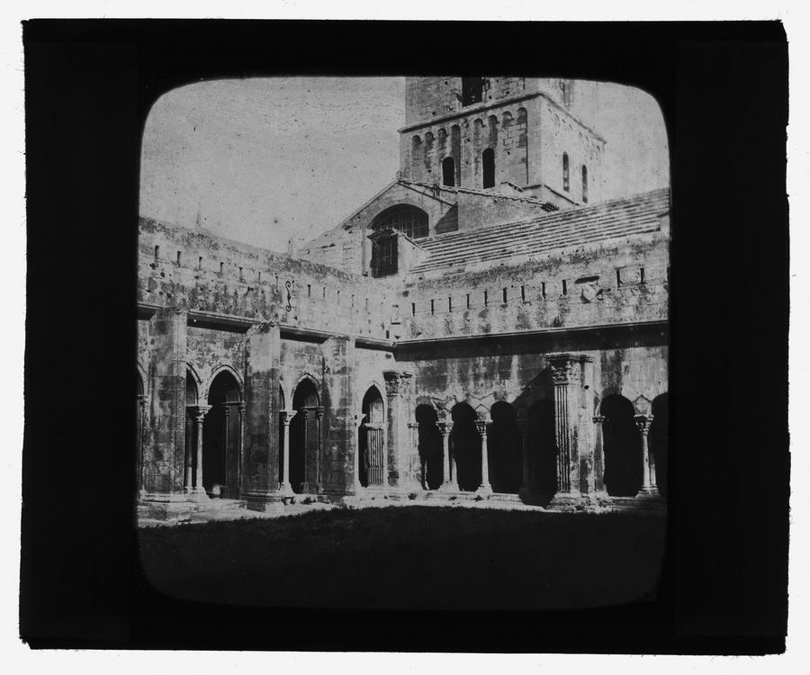 Cloître de l'ancienne cathédrale Saint-Trophime à Arles (Bouches-du-Rhône). Fin 19e siècle. Vue d'une partie du cloître surplombée par le clocher de l'ancienne cathédrale. Etiquette imprimée : "E. Trutat n° "